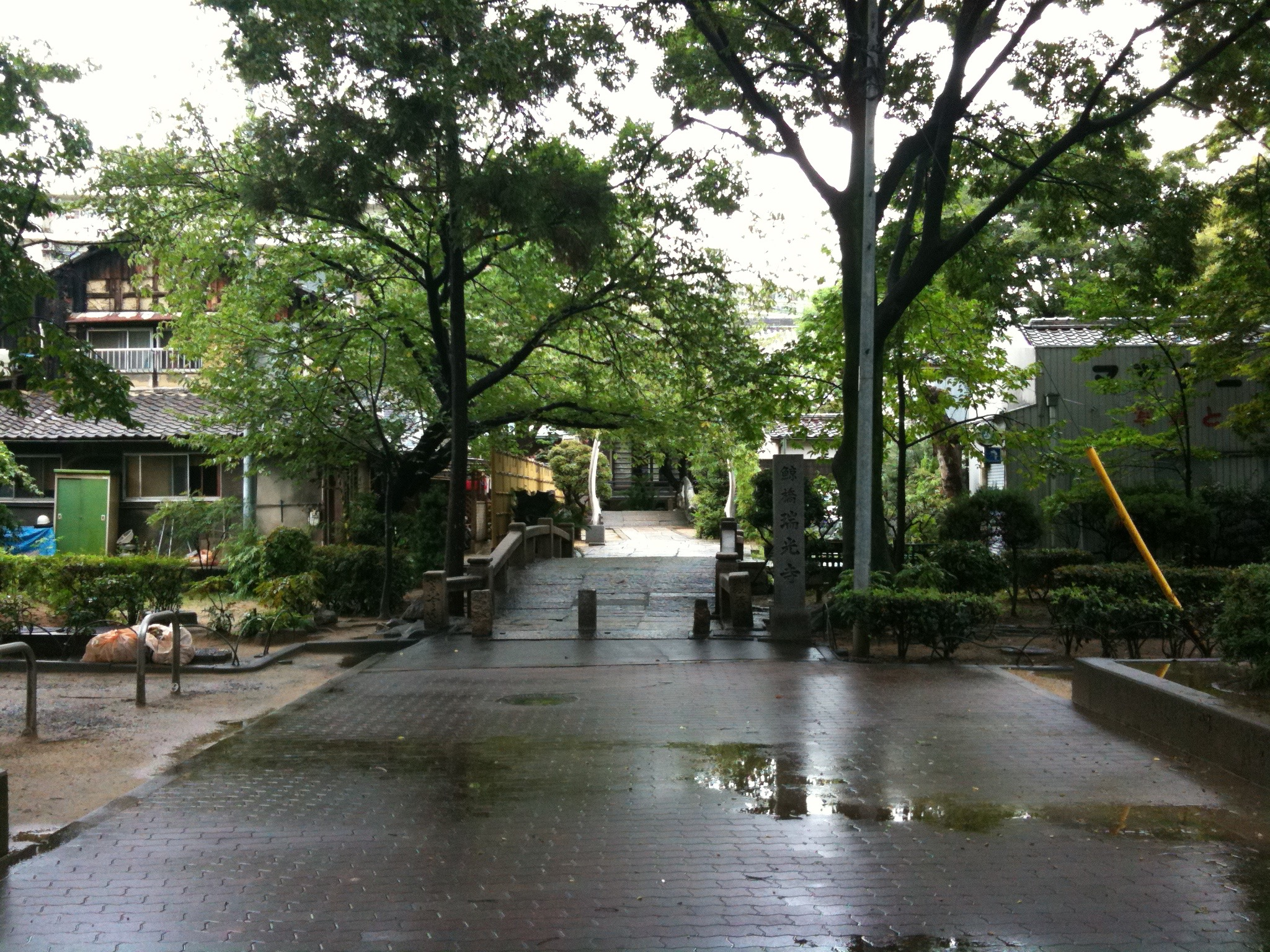 参道入り口